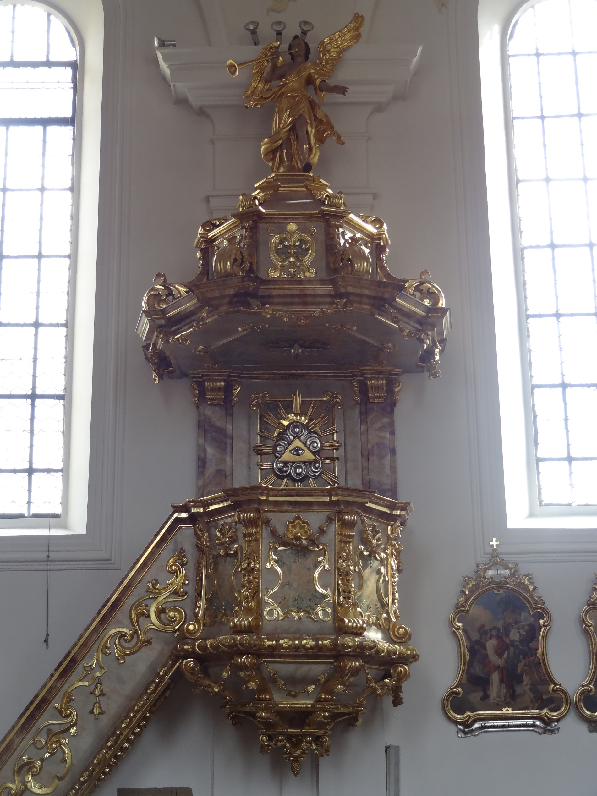 Barocke Kanzel der Pfarrkirche St. Vitus in Offenstetten (Stadt Abensberg, Landkreis Kelheim)